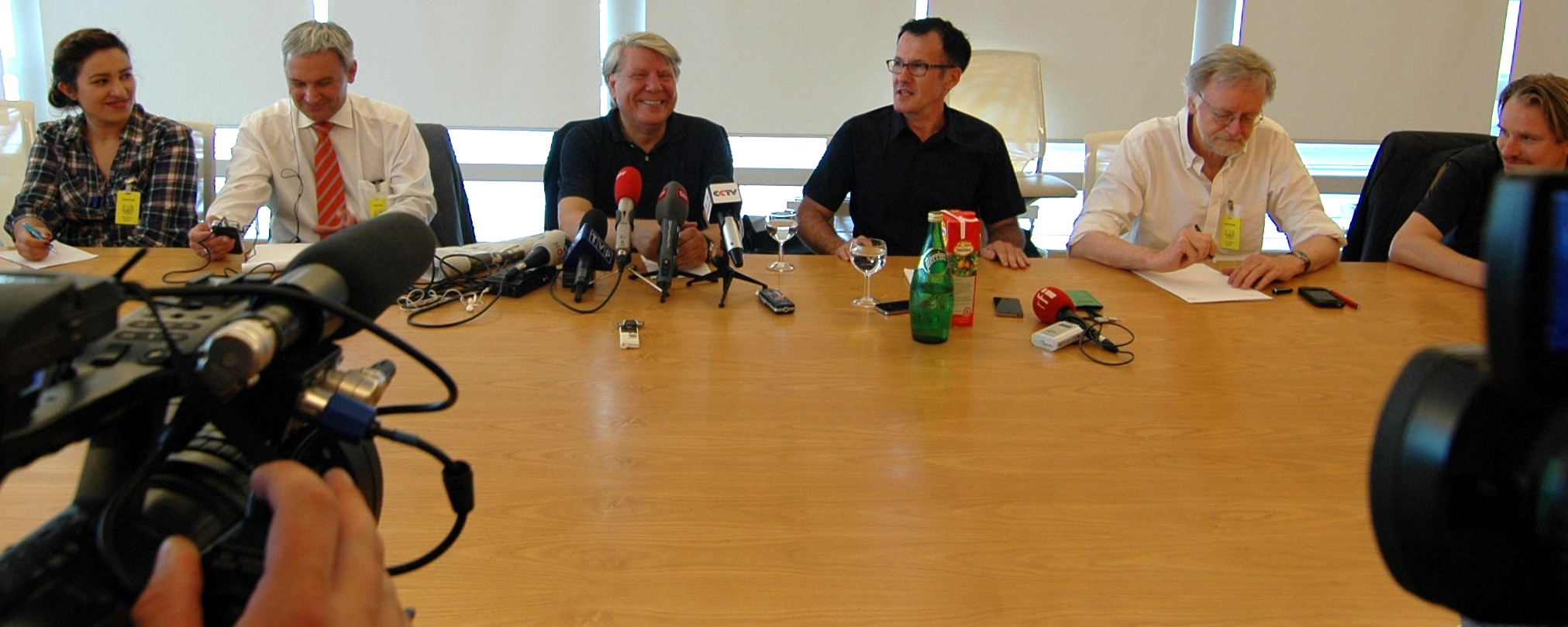 Gespräch mit Prof. Dr. Gunter Gebauer (FU Berlin) über den "Fußball und die Deutschen".